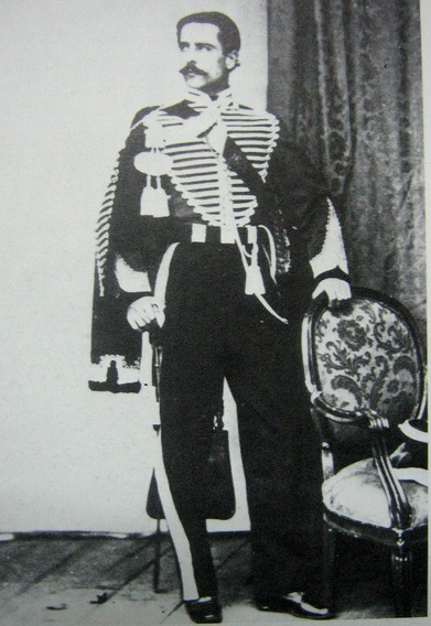 Alfiere del 2º Reggimento Ussari, Regno delle Due Sicilie, 1858